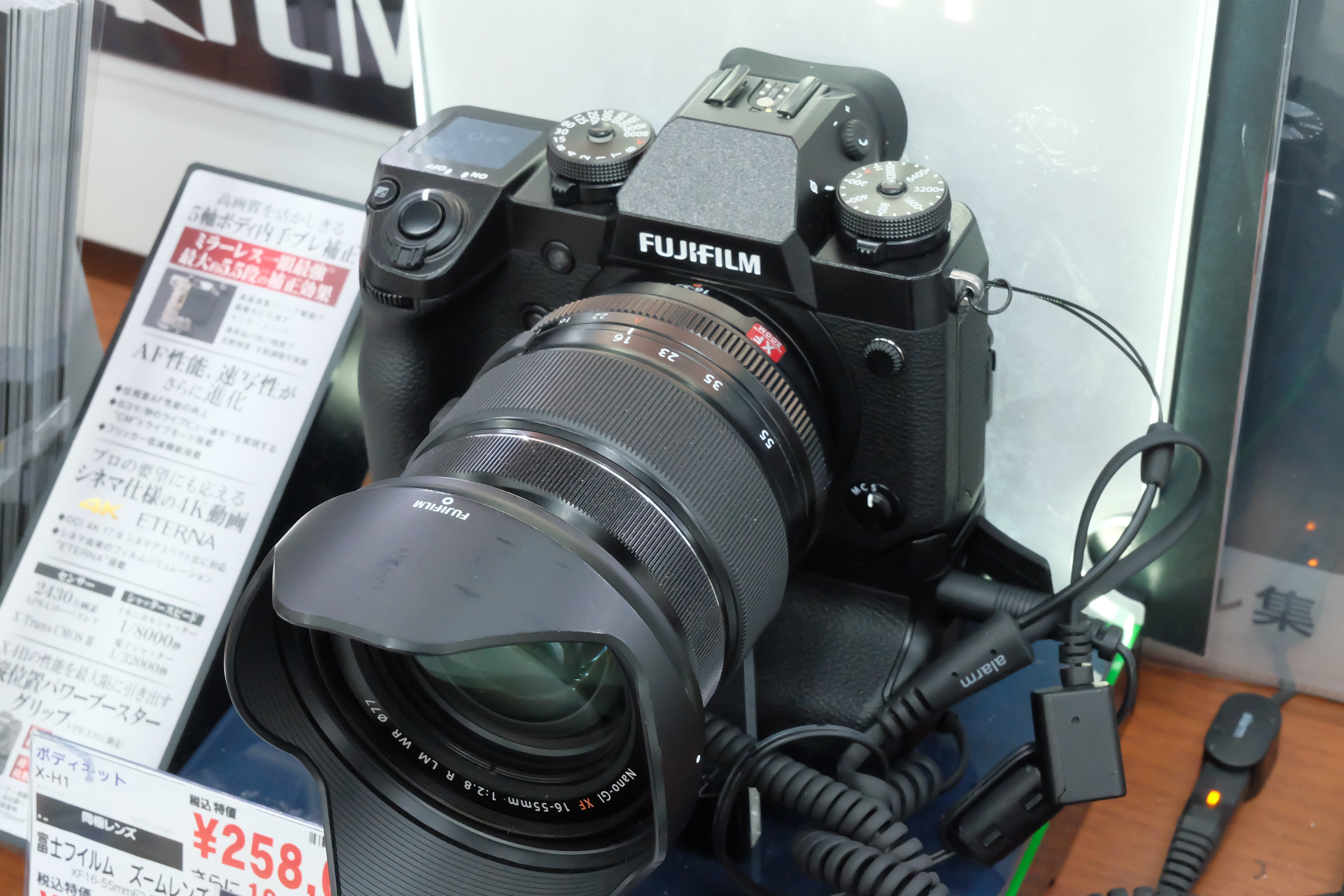 FUJIFILM X-H1